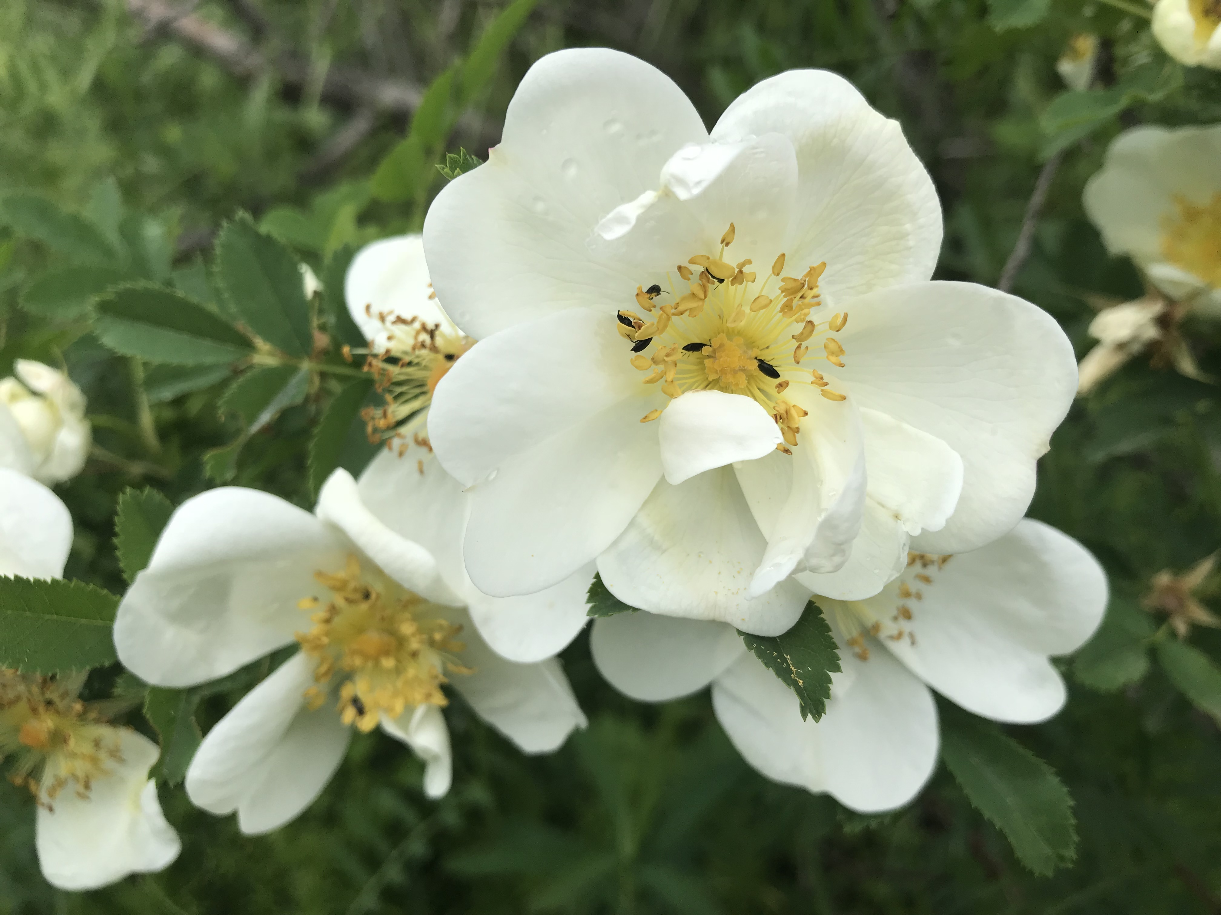 Խոսրովի անտառ